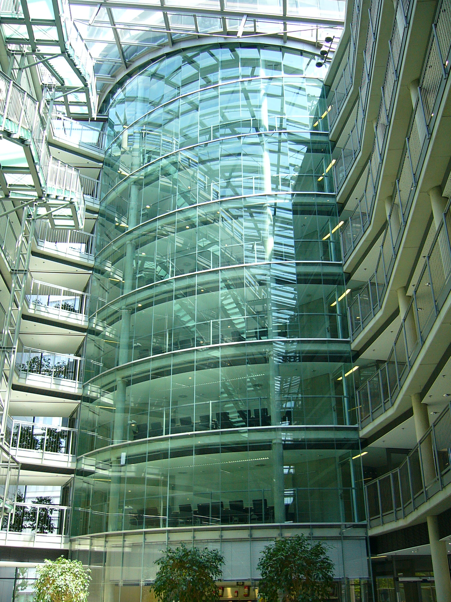 Technisches Rathaus (München) - Einbindung der Turmfassade in das Foyer des Hauses 4